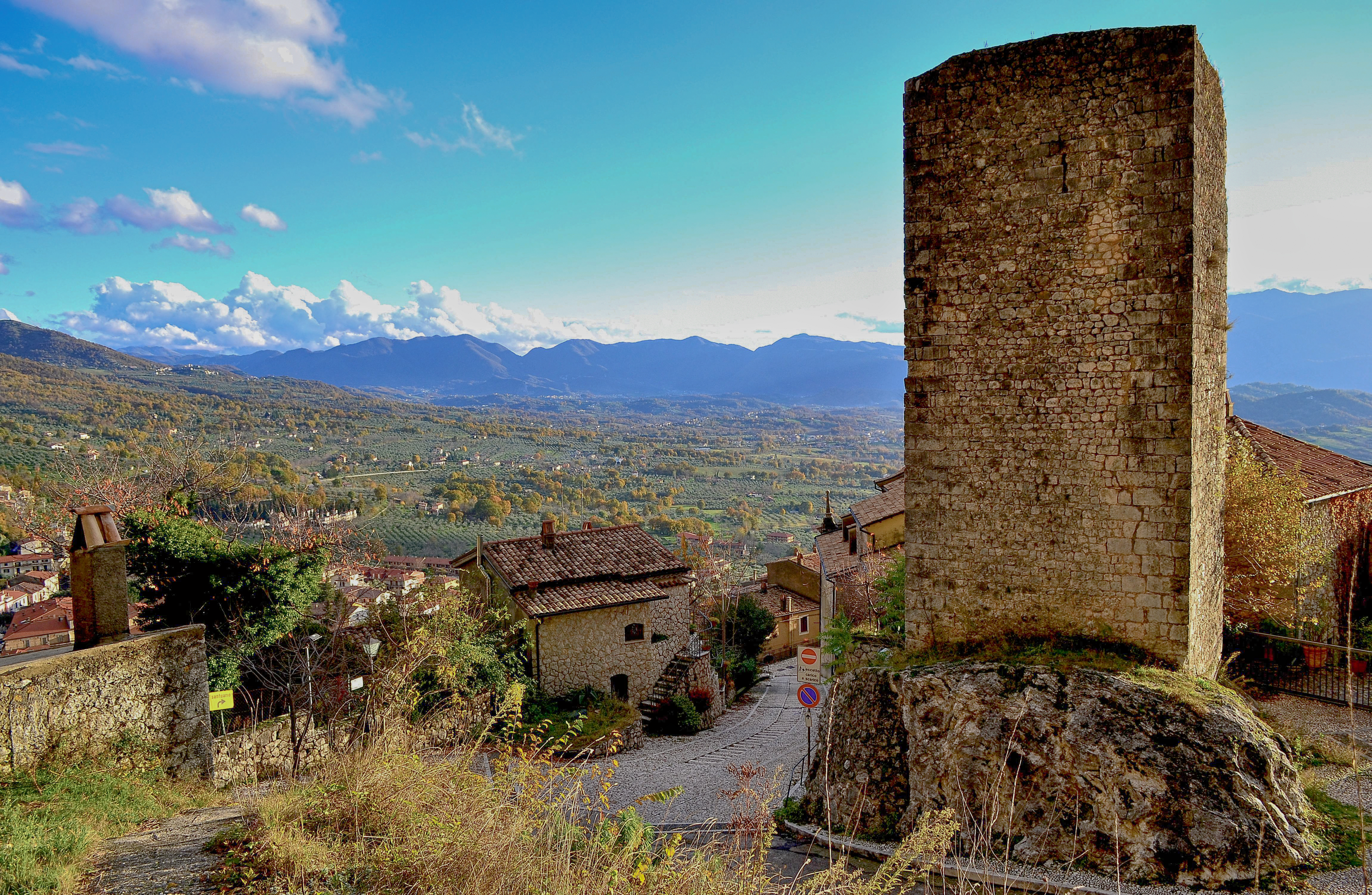 La Torre medievale di San Donato Val di Comino che sorge nel punto più alto del paese